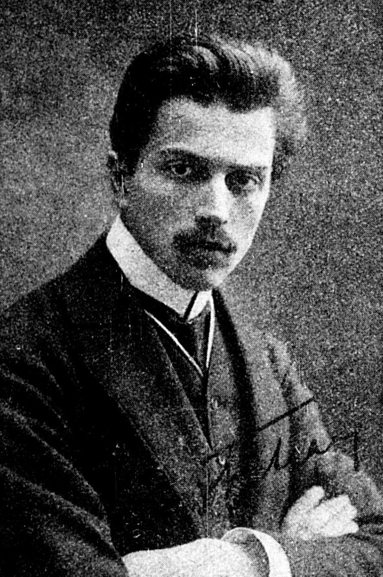 Profesor filologii angielskiej na Uniwersytecie Warszawskim Andrzej Tretiak